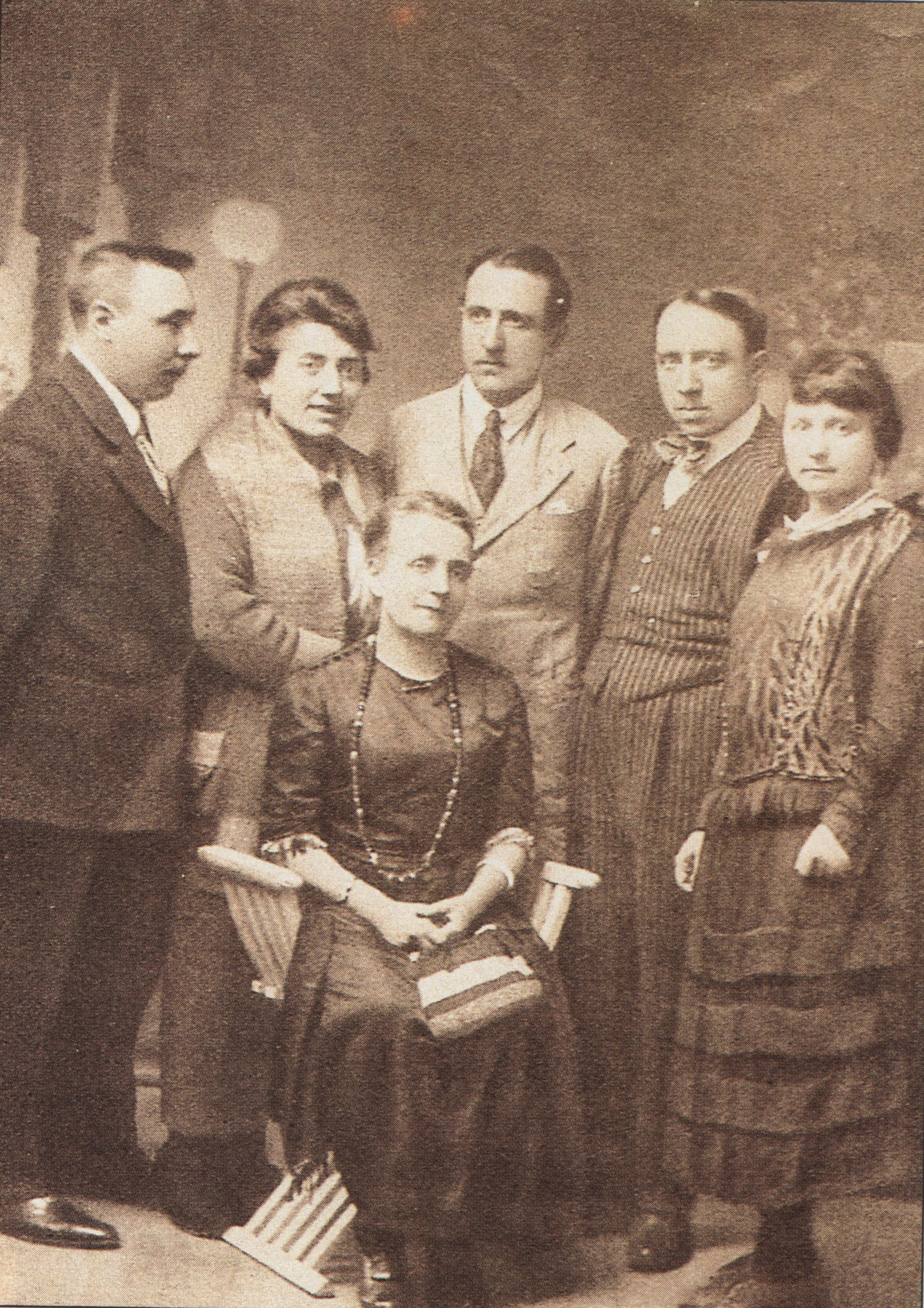 Maeztu-Whitney familiako kideak. Juana Whitney bere seme-alabez inguratuta, ezkerretik eskuinera: Gustavo, Angela, Ramiro, Miguel eta Maria Maeztu.